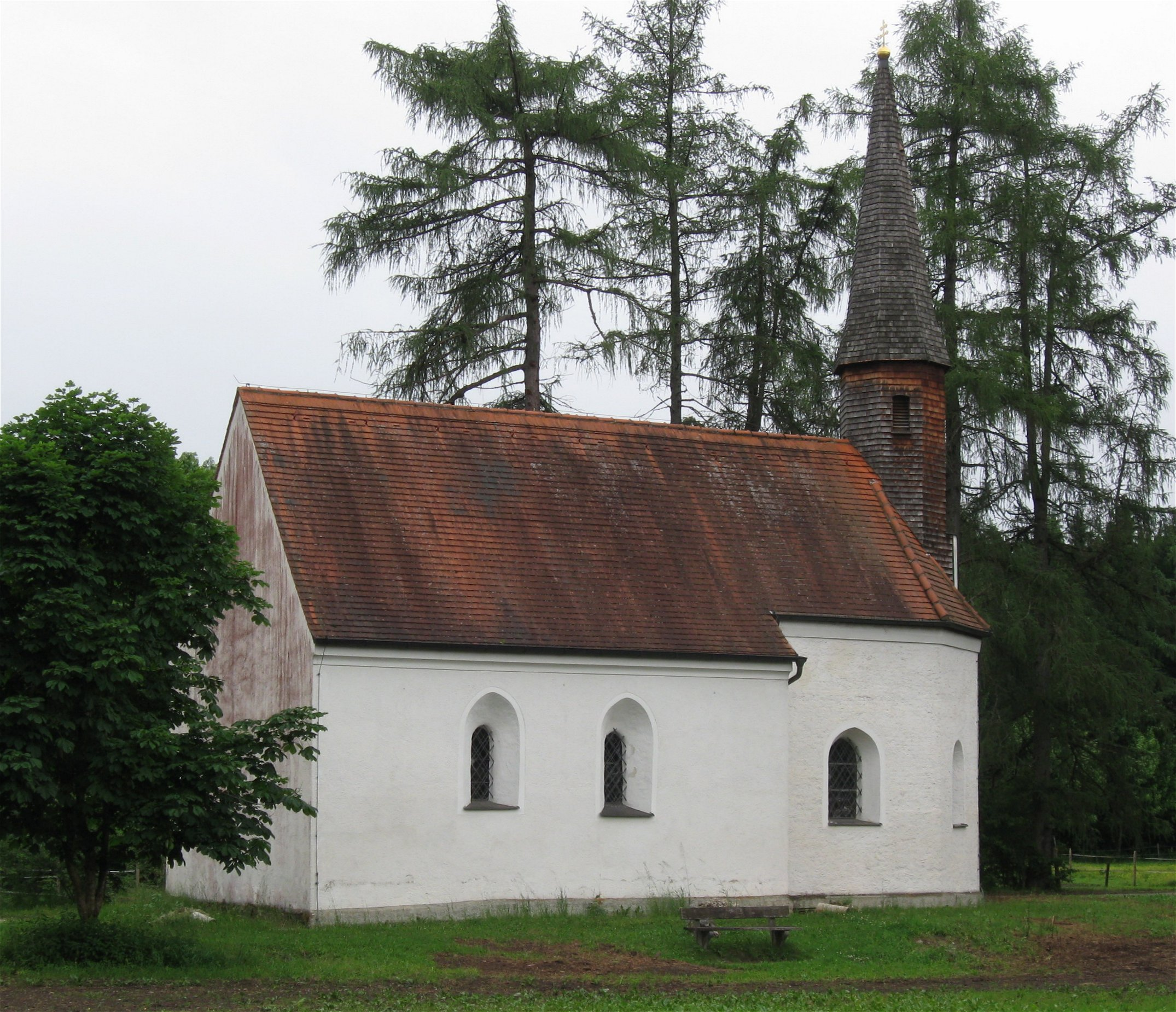 Kath. Filialkirche St. Ulrich, spätgotischer Saalbau mit eingezogenem Polygonalchor und okotogonalem Dachreiter, 15. Jh., Barockisierung im 18. Jh.; mit Ausstattung. Sauerlach